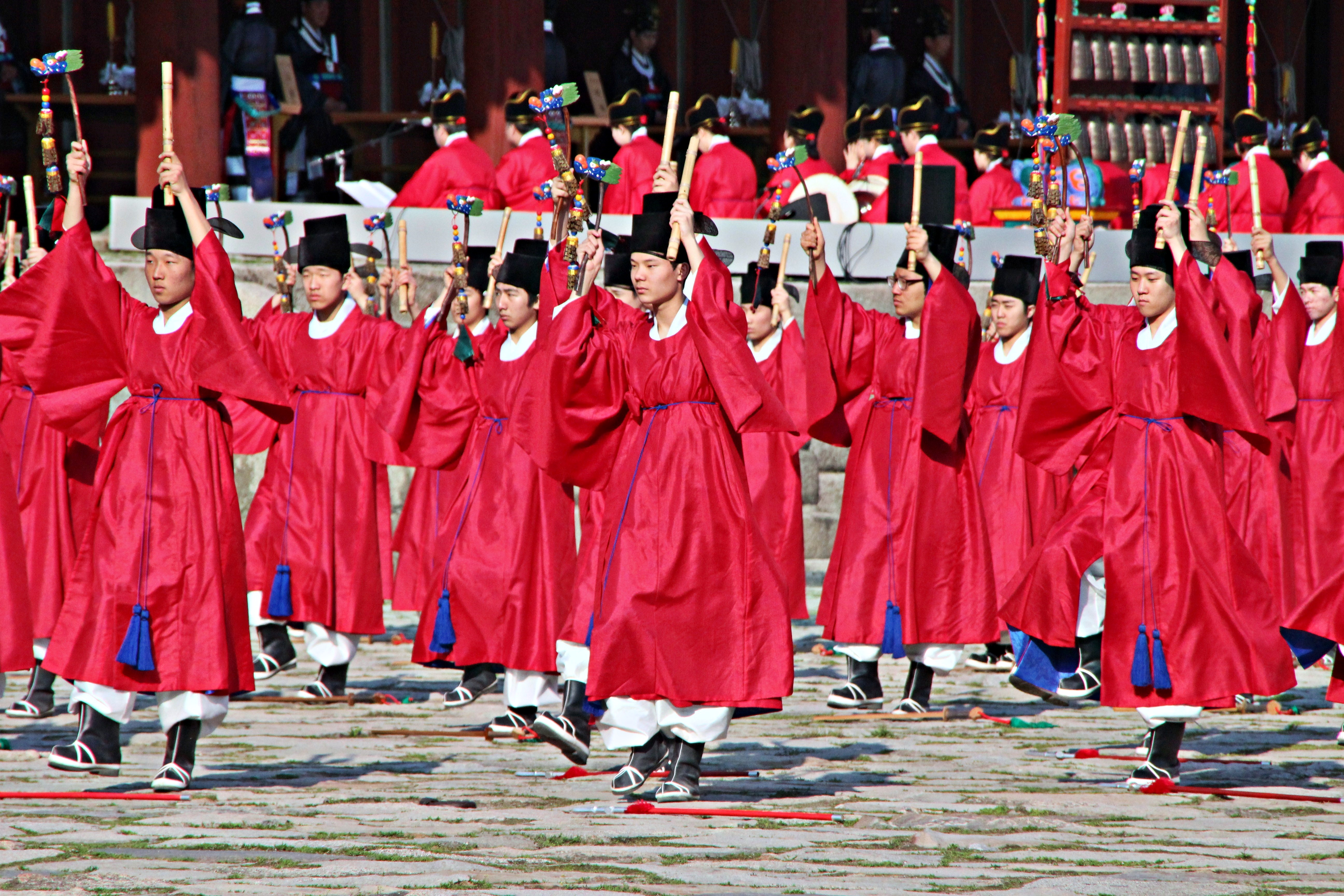 Other ingredients usually added when the ancestral rites at Jongmyo royal shrine: ancestral rites music, singing, dancing and instrumental music.